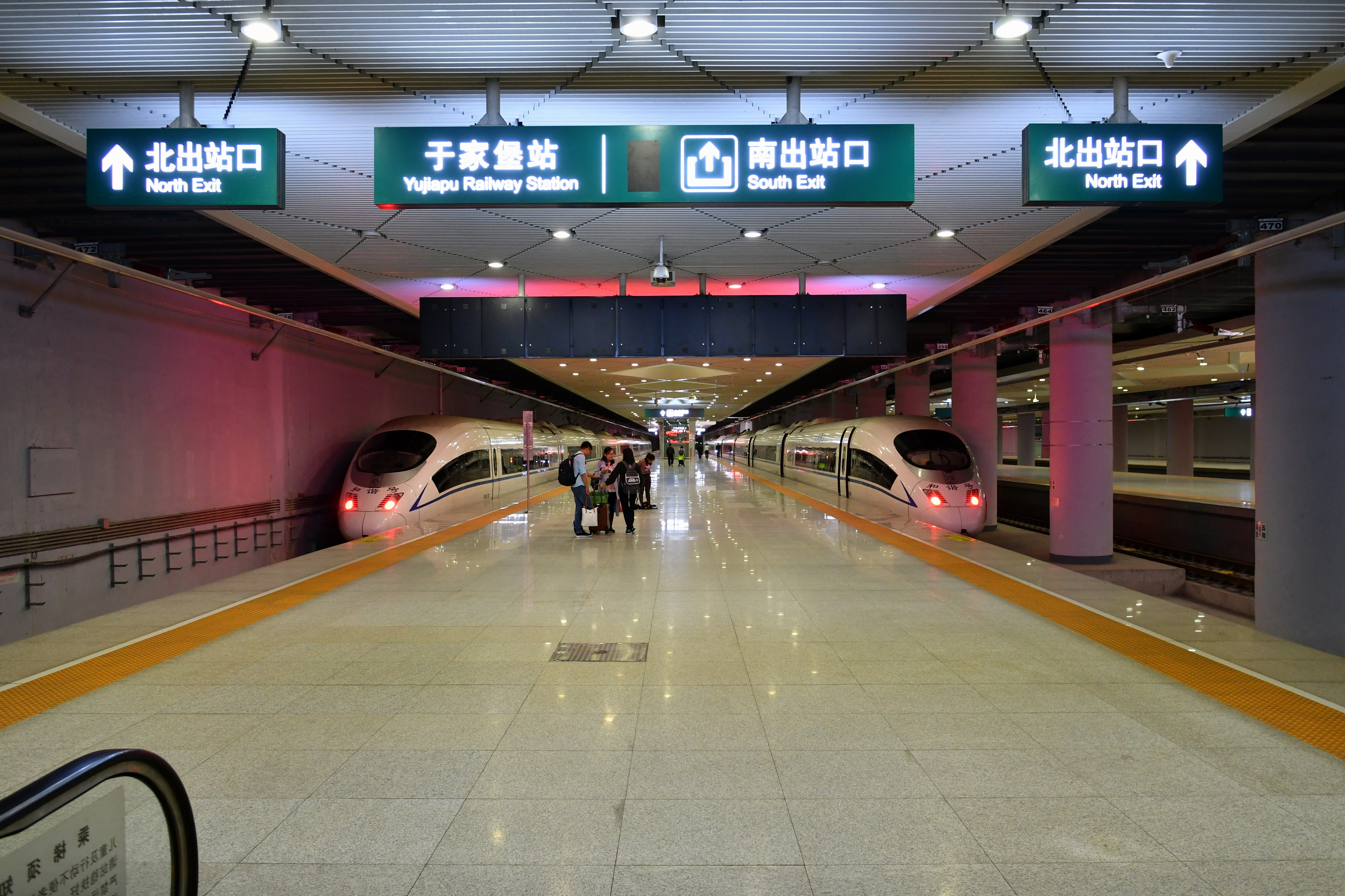 于家堡火车站地下二层站台